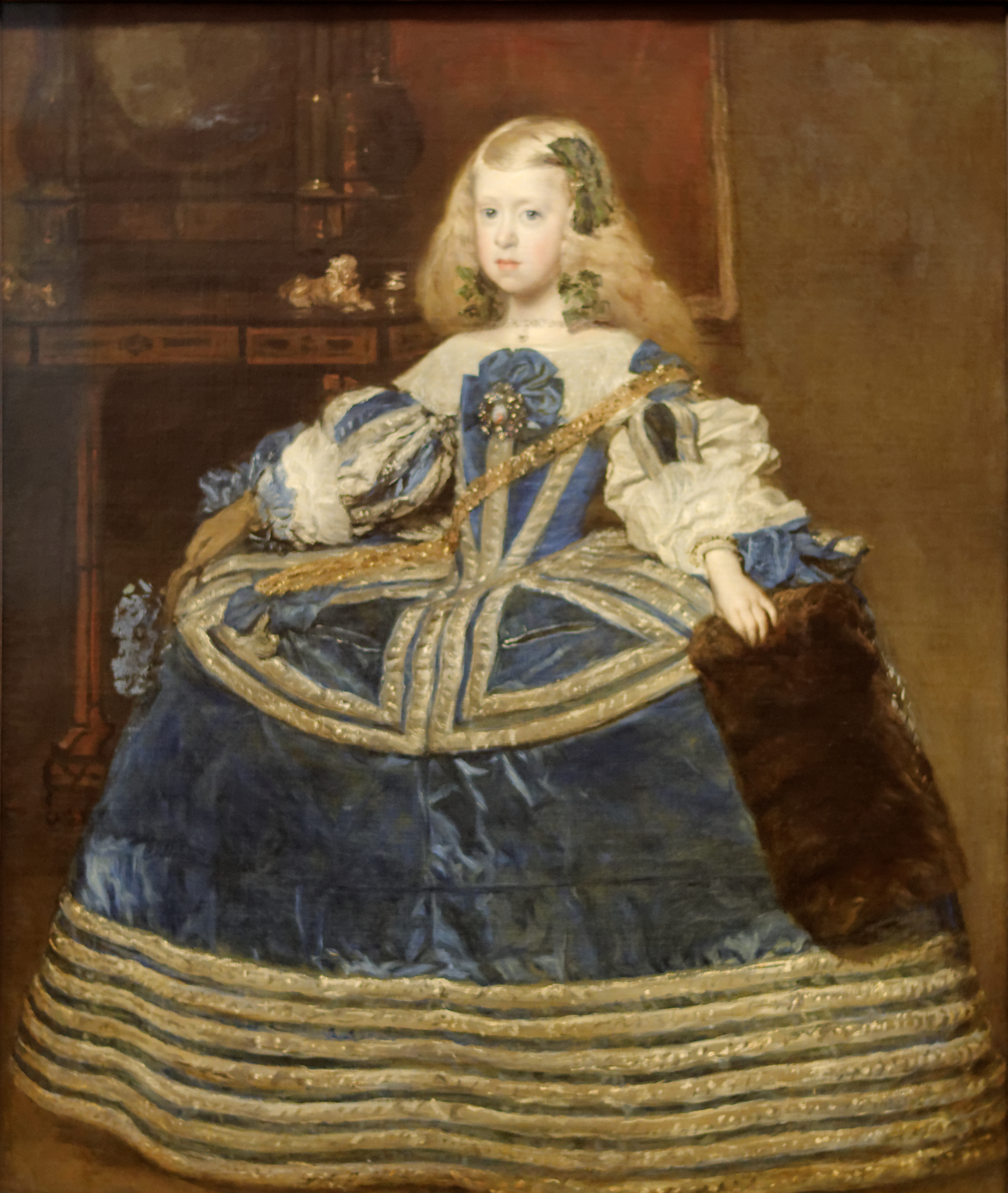 Exposé au Kunsthistorisches Museum (Inv.-Nr 2130). Un an avant sa mort, Velasquez peint ce portrait de l'Infante et celui de son frère cadet Philippe Prosper d'Autriche (Inv.-Nr 319), portraits qui seront ses dernières œuvres achevées. La même année le portrait fut envoyé à Leopold I qui épousa l'Infante en 1666. Le style du peintre atteint son apogée ici avec de larges taches de couleurs vives qui produisent presque un effet impressionniste de sorte que l'observateur doit se tenir à distance pour avoir une vue d'ensemble de l'oeuvre